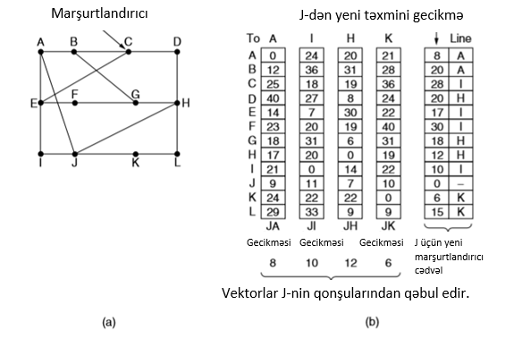 qraflar